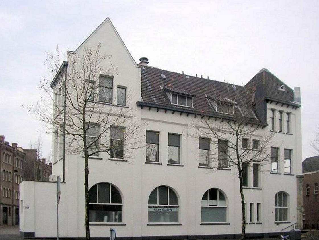 Voormalige hoofkantoor en stationsgebouw van de voormalige R.T.M.(Rotterdamsche Tramweg Maatschappij).